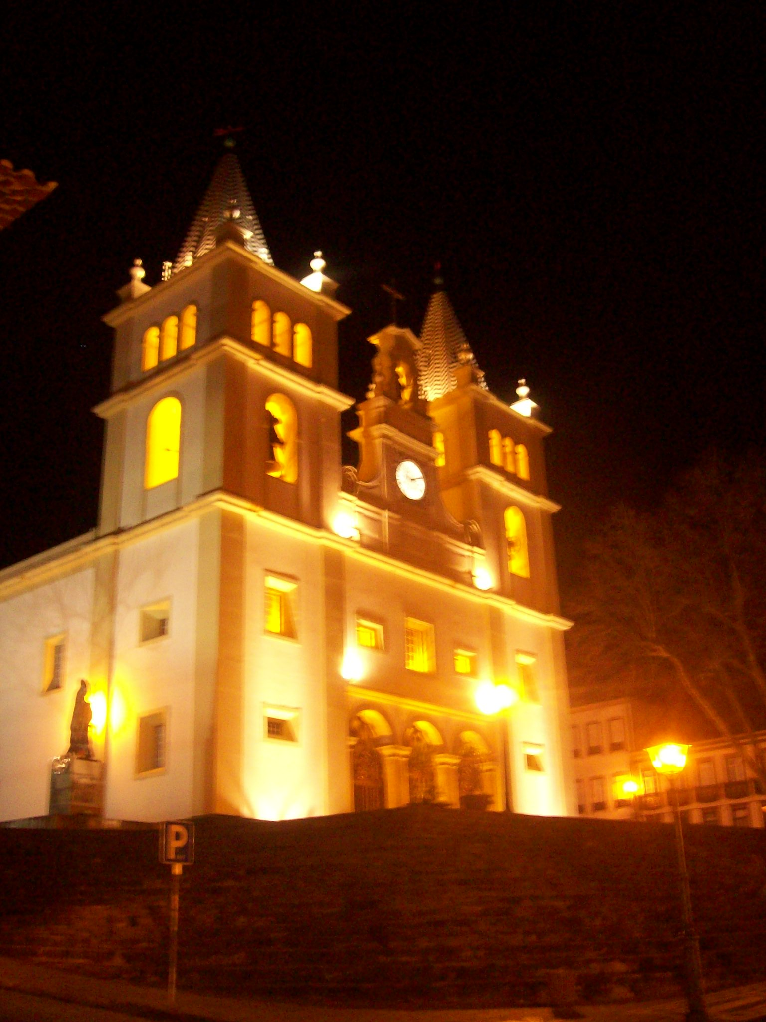 Iluminação nocturna da Sé